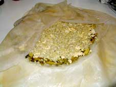 pastilla9 Photo sous gfdl, prise par Etape de réalisation de la recette de la pastilla. Anthere